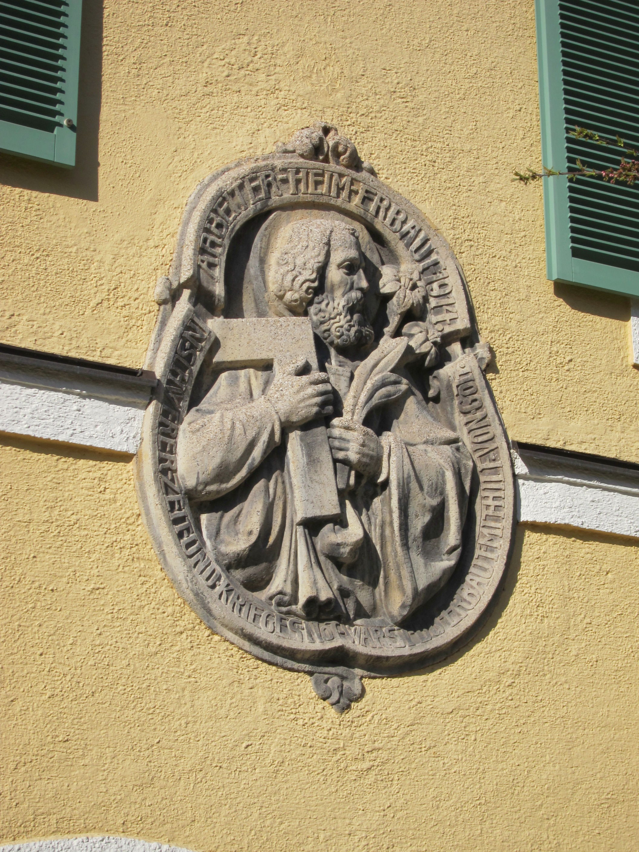 Peter-Putz-Straße 6/8/10; Wohnanlage Arbeiterheim, 1914 von Josef Schormüller und den Gebrüder Ott; Relief über dem Eingang von Nr. 8